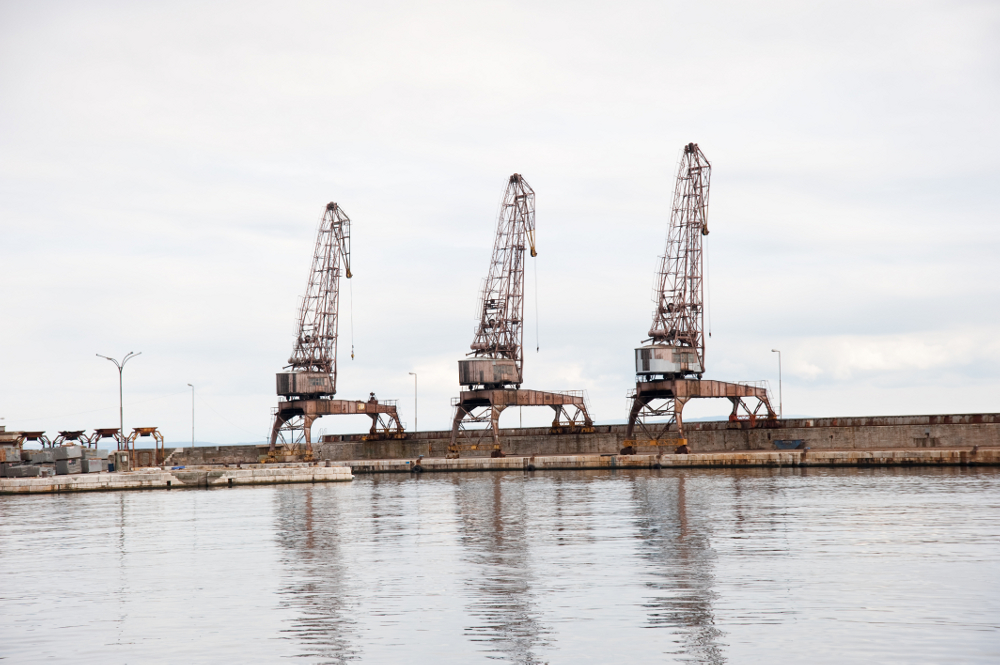 Dizalica u riječkoj luci